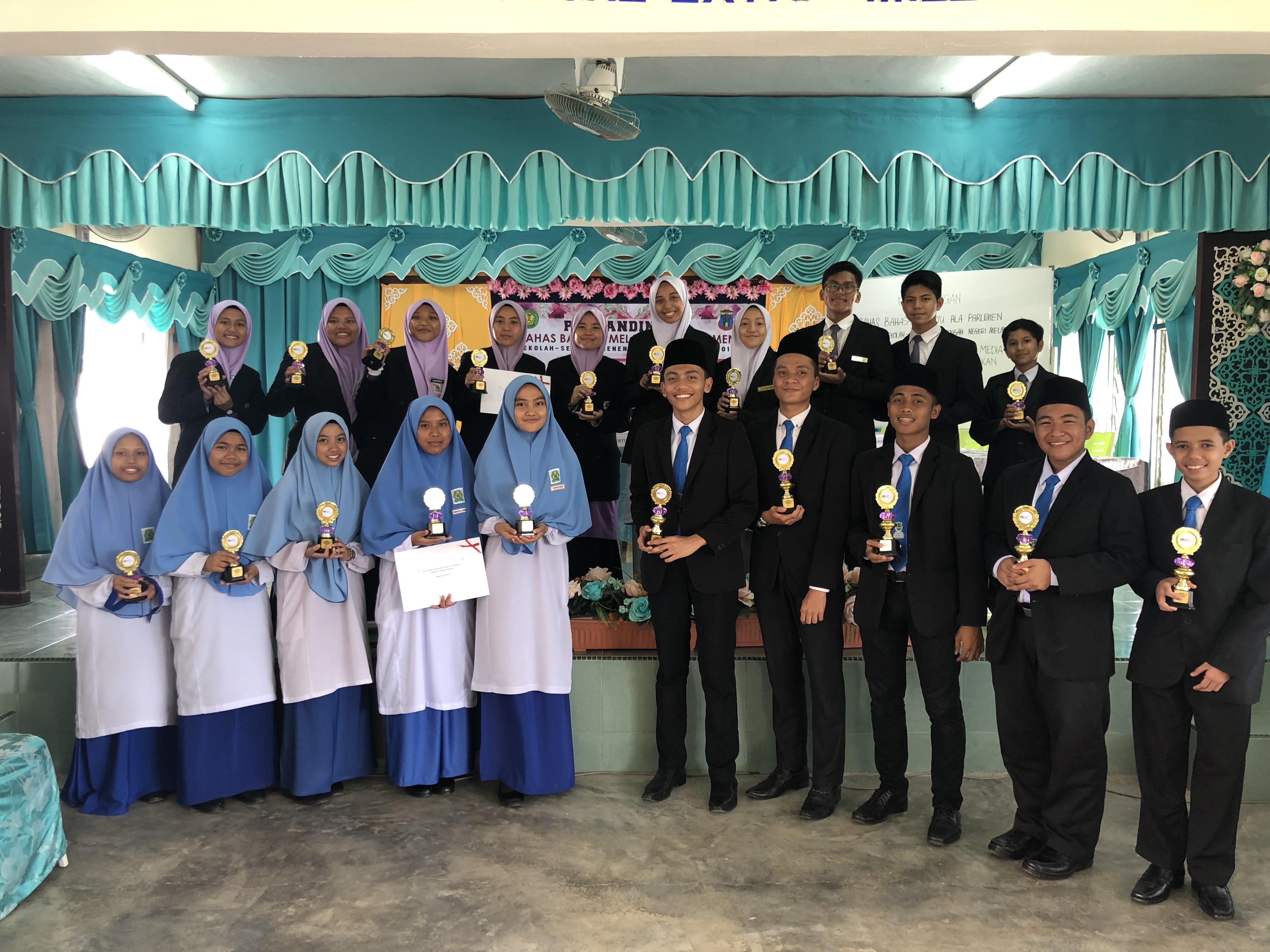 Johan Pertandingan Bahas Bahasa Melayu Ala Parlimen Sekolah-Sekolah Menegah Negeri Melaka 2019